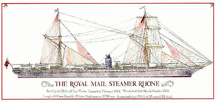 Le RMS Rhone de la Royal Mail Steam Packet Company (1865-67)